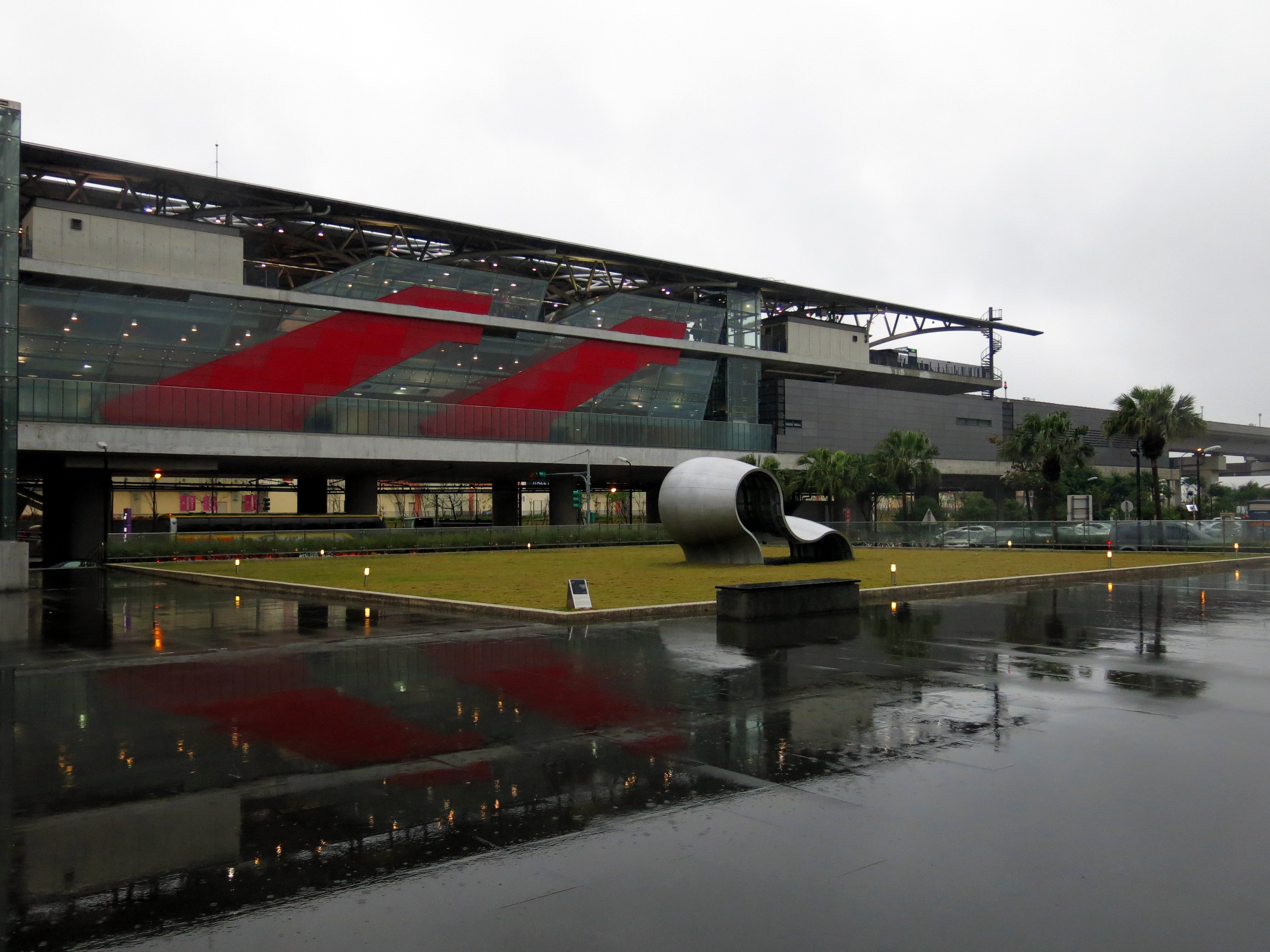 中文（台灣）: 桃園捷運機場線A18高鐵桃園站